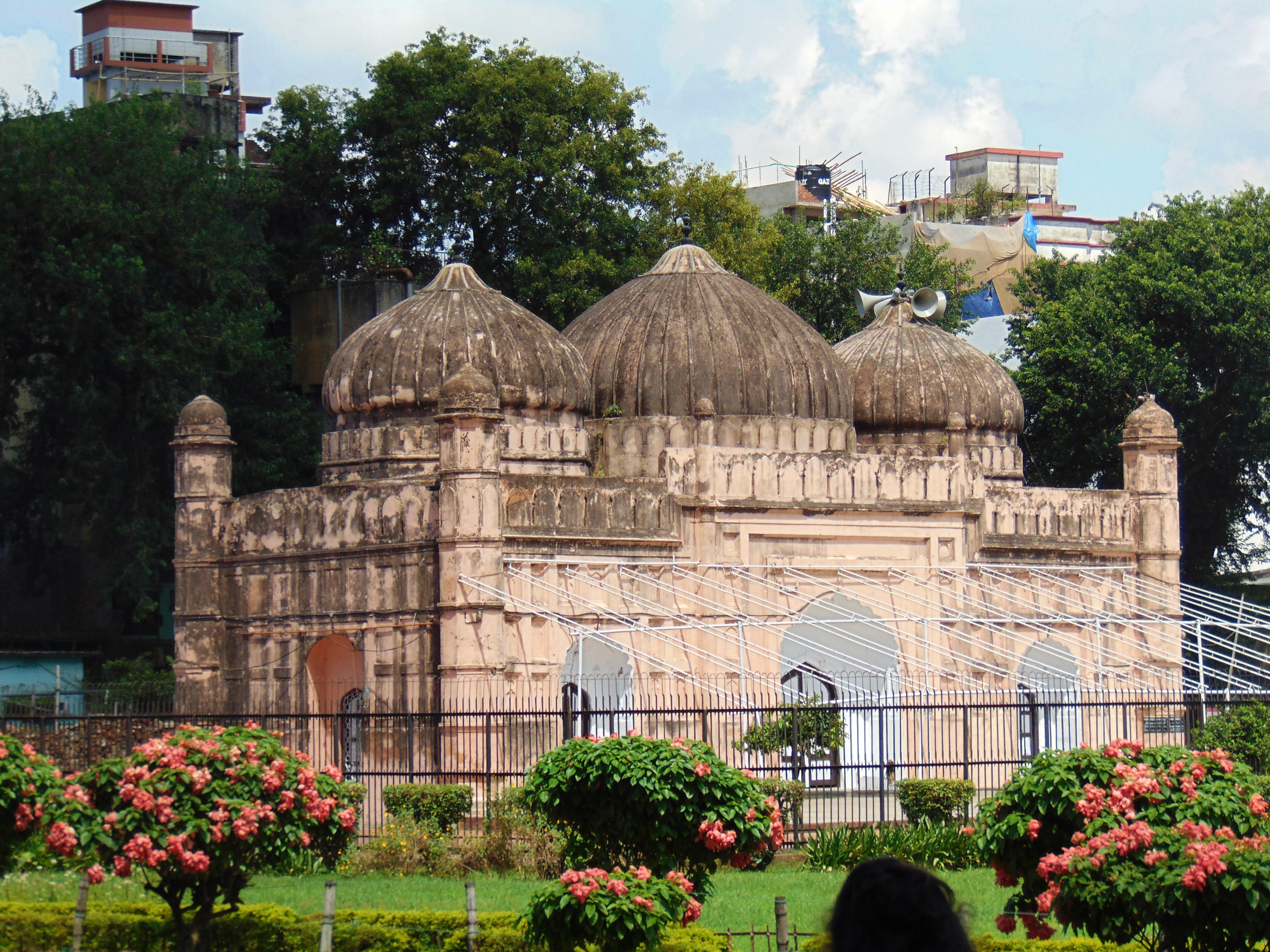 লালবাগ দুর্গ মসজিদ